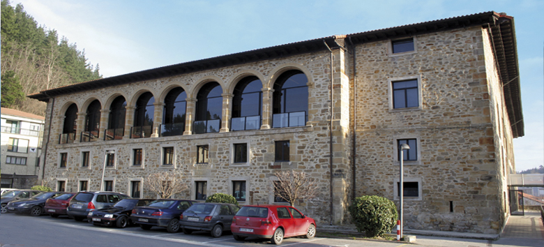 Edificio de la Facultad de Humanidades y Ciencias de la Educacion en Eskoriatza